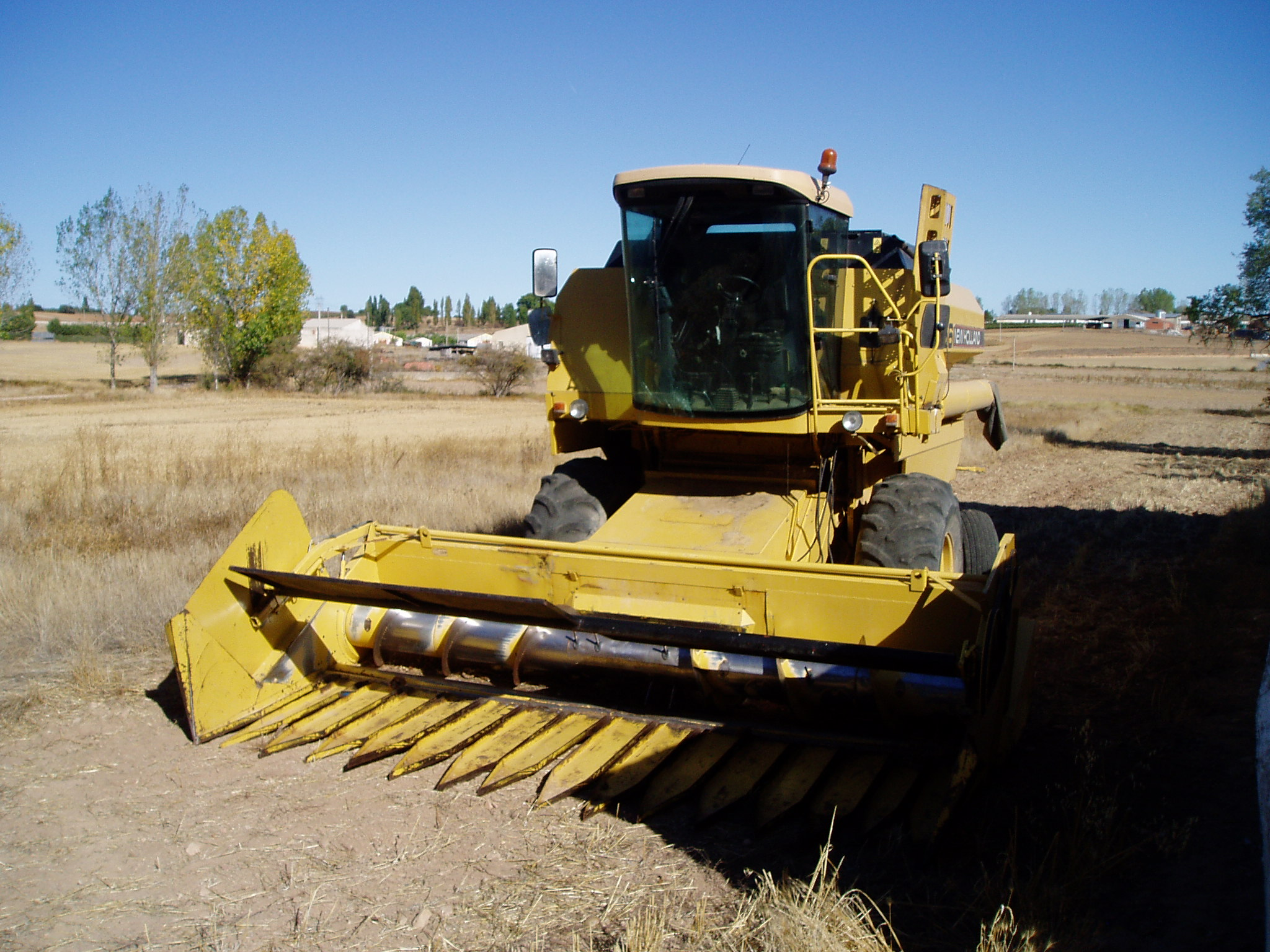 Una cosechadora.